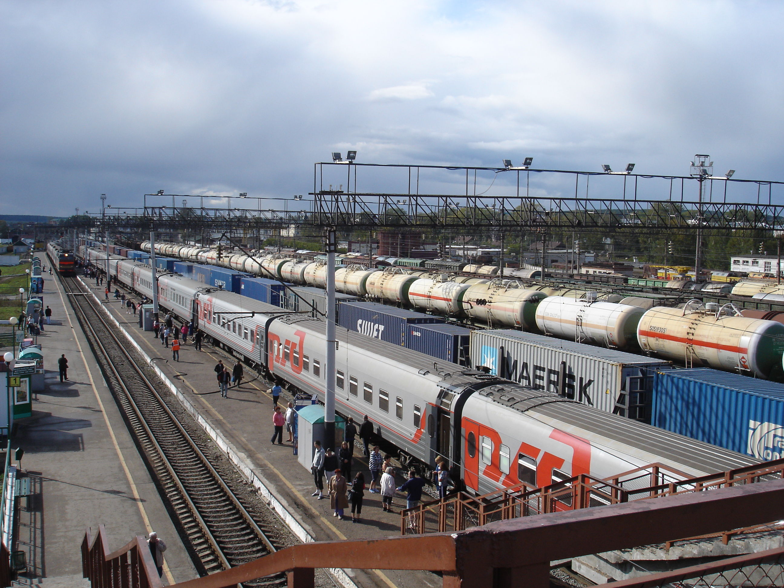 Агрыз - административный центр Агрызского района Татарстана. Железнодорожная станция Агрыз Горьковской ЖД. Общий вид на территорию станции и пути.